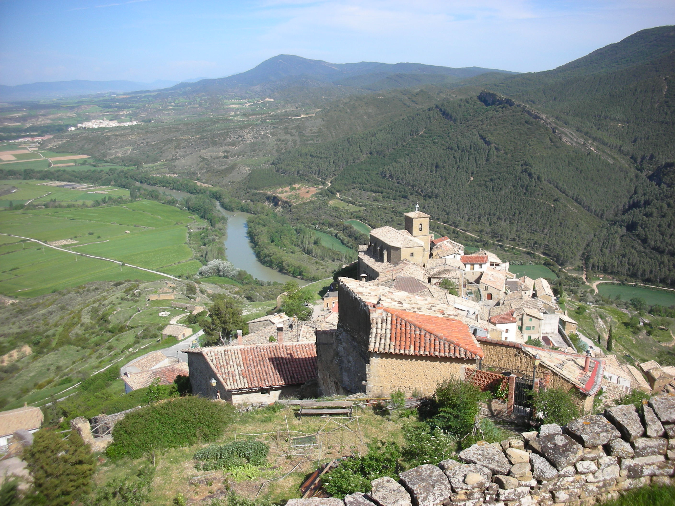 Vista general del pueblo de Gallipienzo desde la iglesia de San Salvador, con el rio Aragón al fondoEuskara: Galipentzu herriko ikuspegi orokorra San Salbador elizatik, atzealdean Aragoi ibaia duela